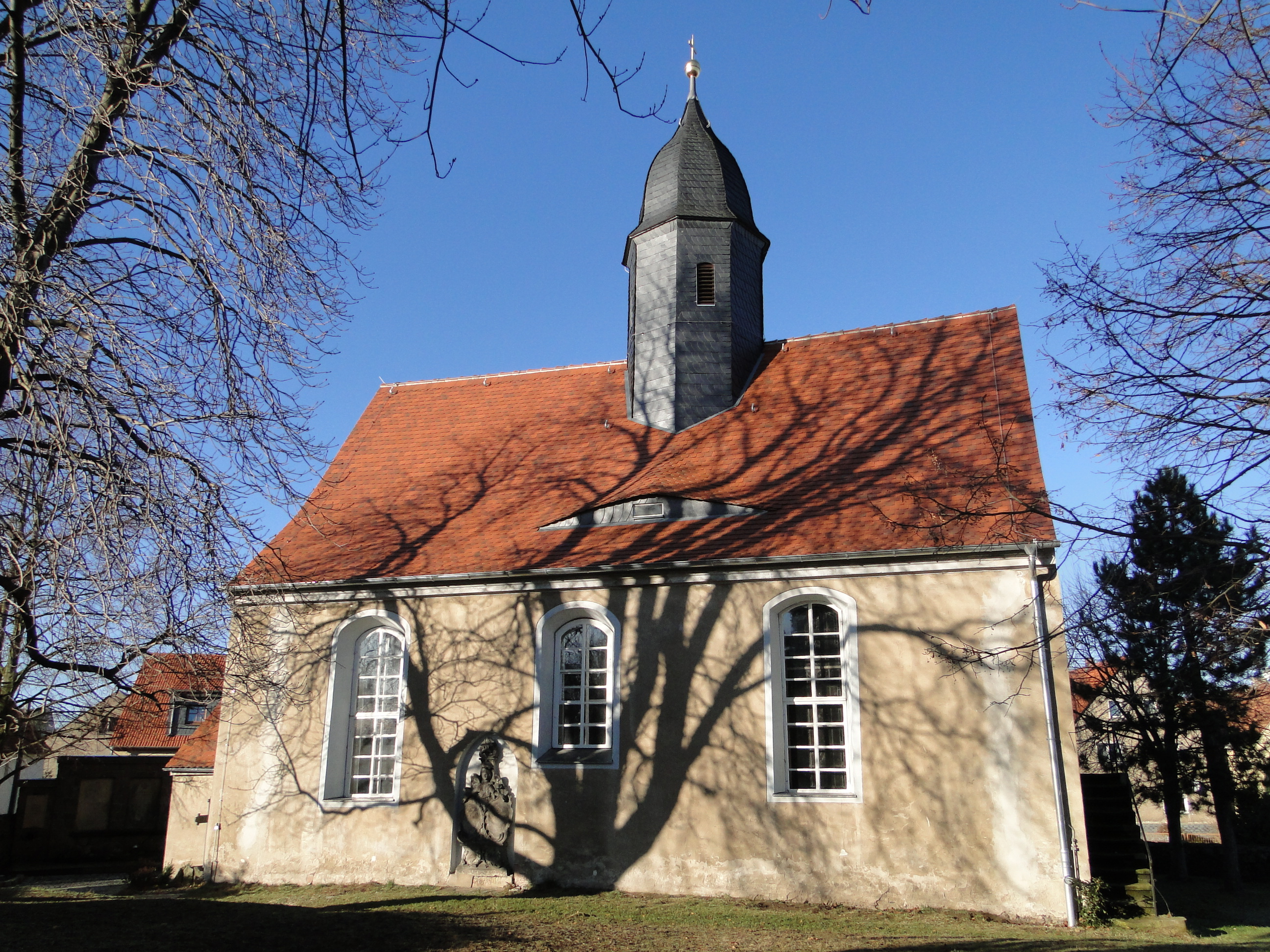 Christophoruskirche Dresden-Wilschdorf